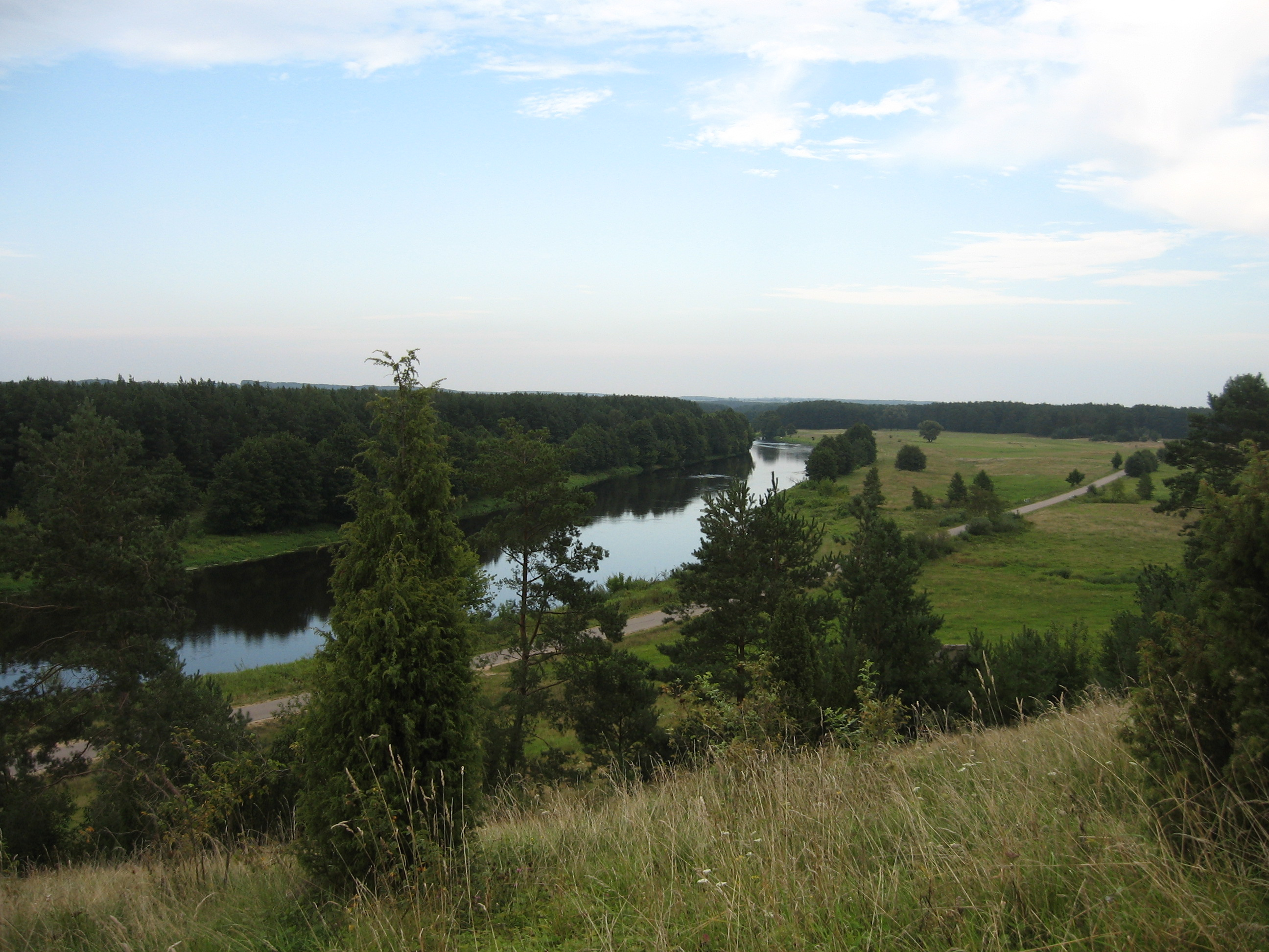 Szablak